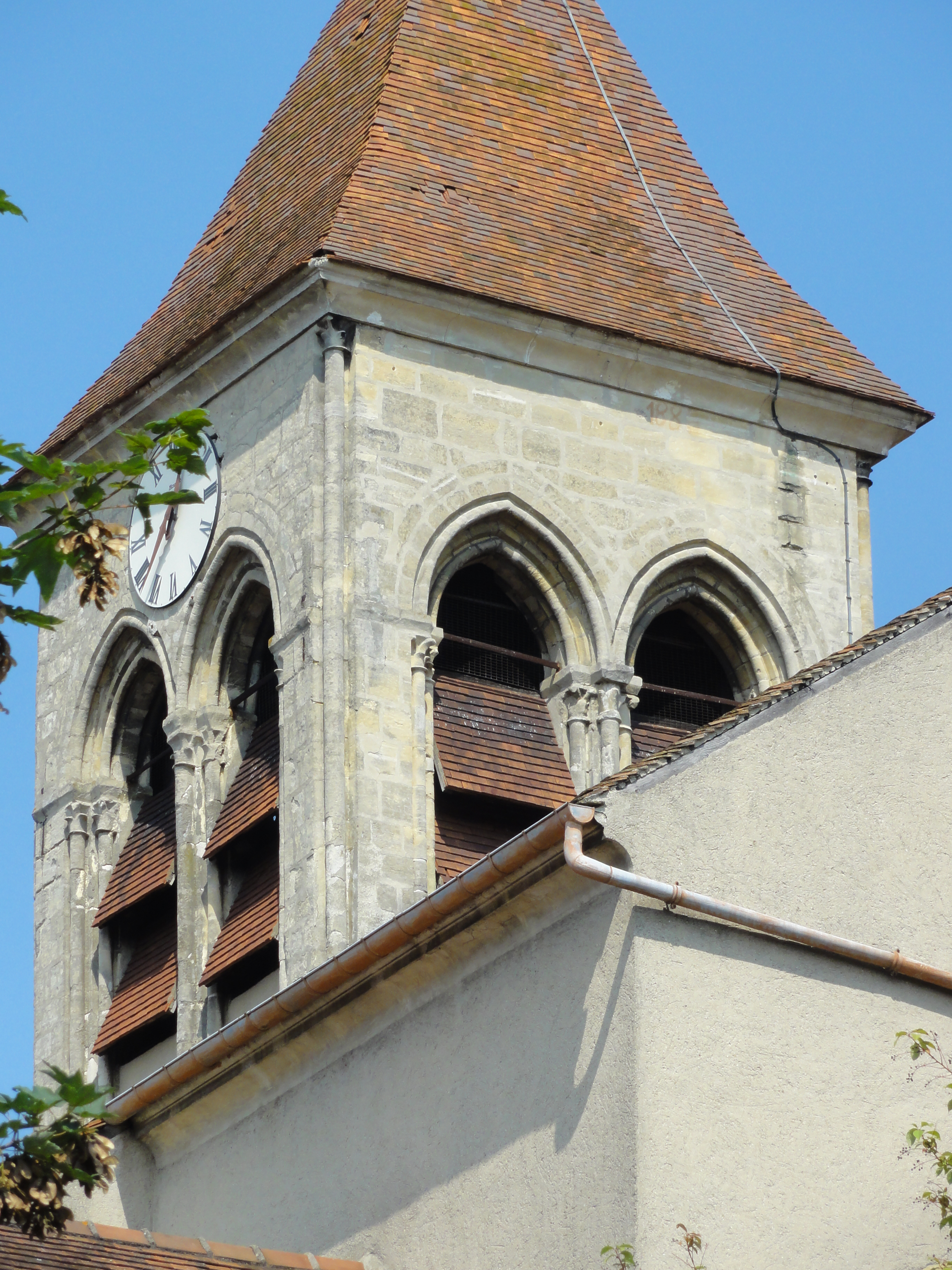 Clocher, côté sud-est.